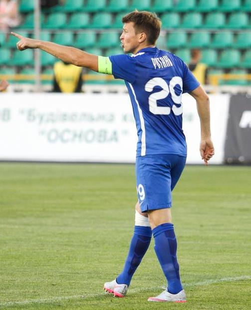 Руслан Ротань - футболіст Дніпра